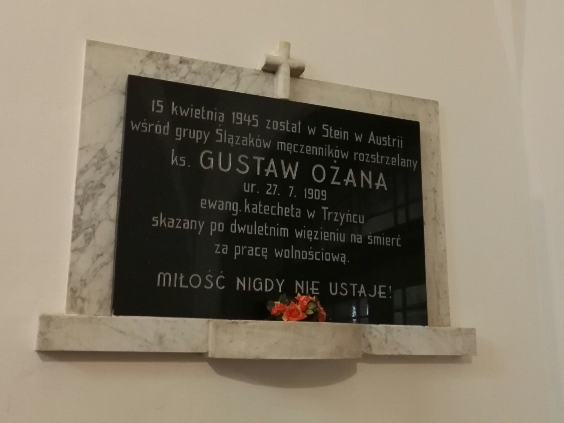 Pamětní deska evangelického katechety Gustwa Ożany v evangelickém kostele v Třinci (1909-1945)